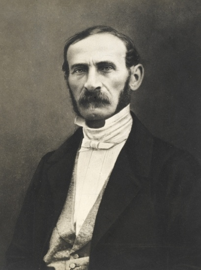 Le général Cavaignac photographié par Pierre Petit.